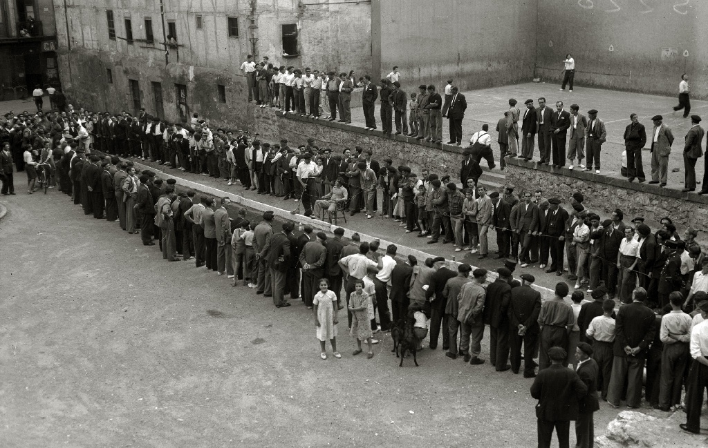 Bola jokoan Donostiako Trinitate plazan, eskuzulo aldaeran jokatzen.